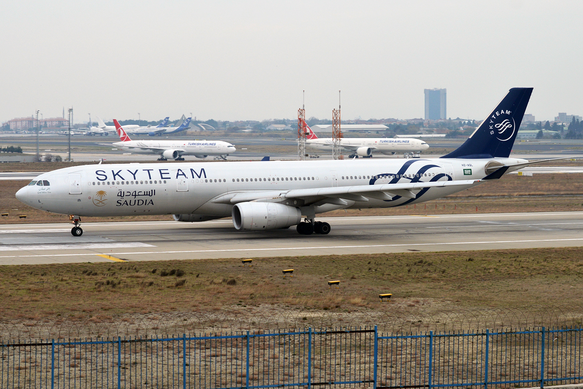 Saudia, HZ-AQL, Airbus A330-343